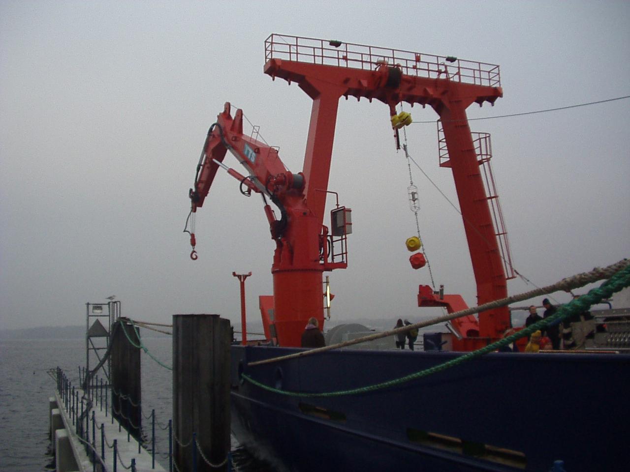 Forschungsschiff Meteor - Aufbauten